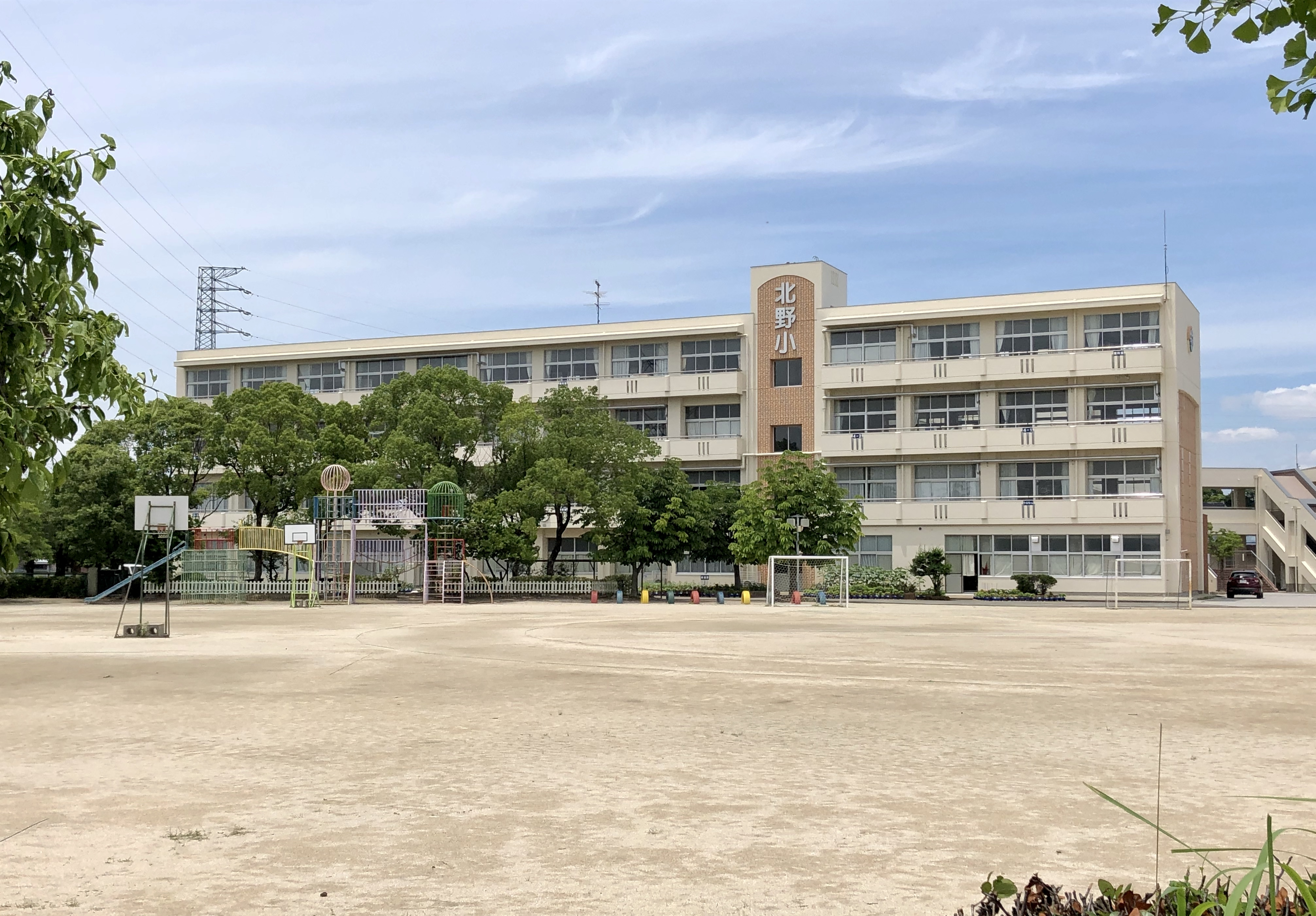 岡崎市立北野小学校（岡崎市北野町）